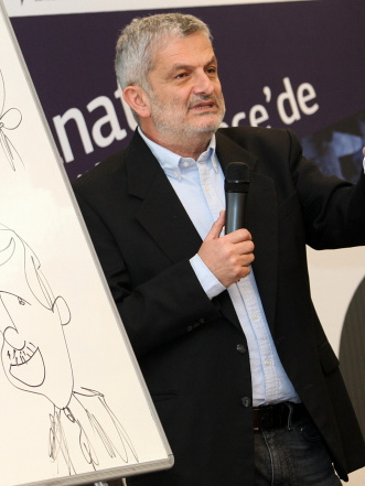 Salih Memecan